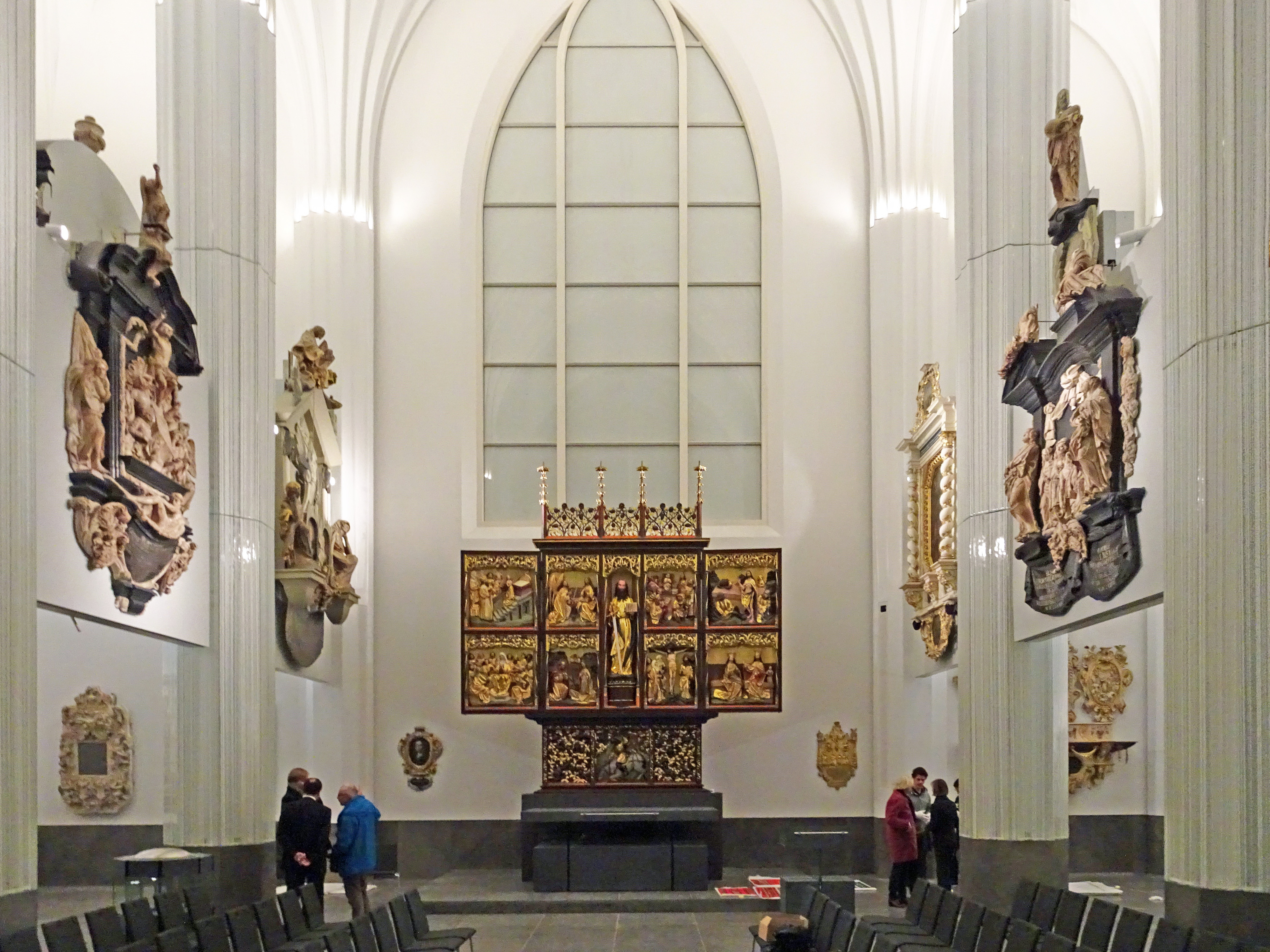 Blick in den Altarraum der Leipziger Universitätskirche